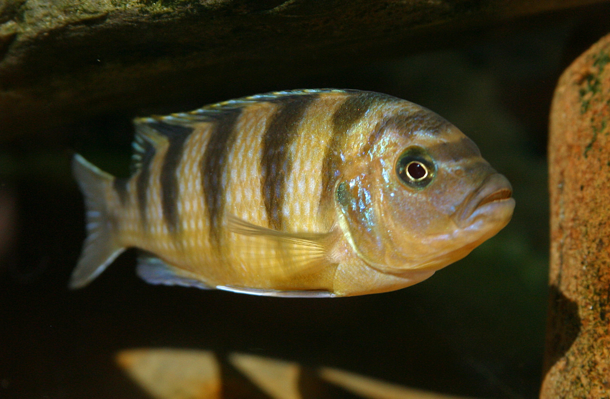 Pseudotropheus lombardoi